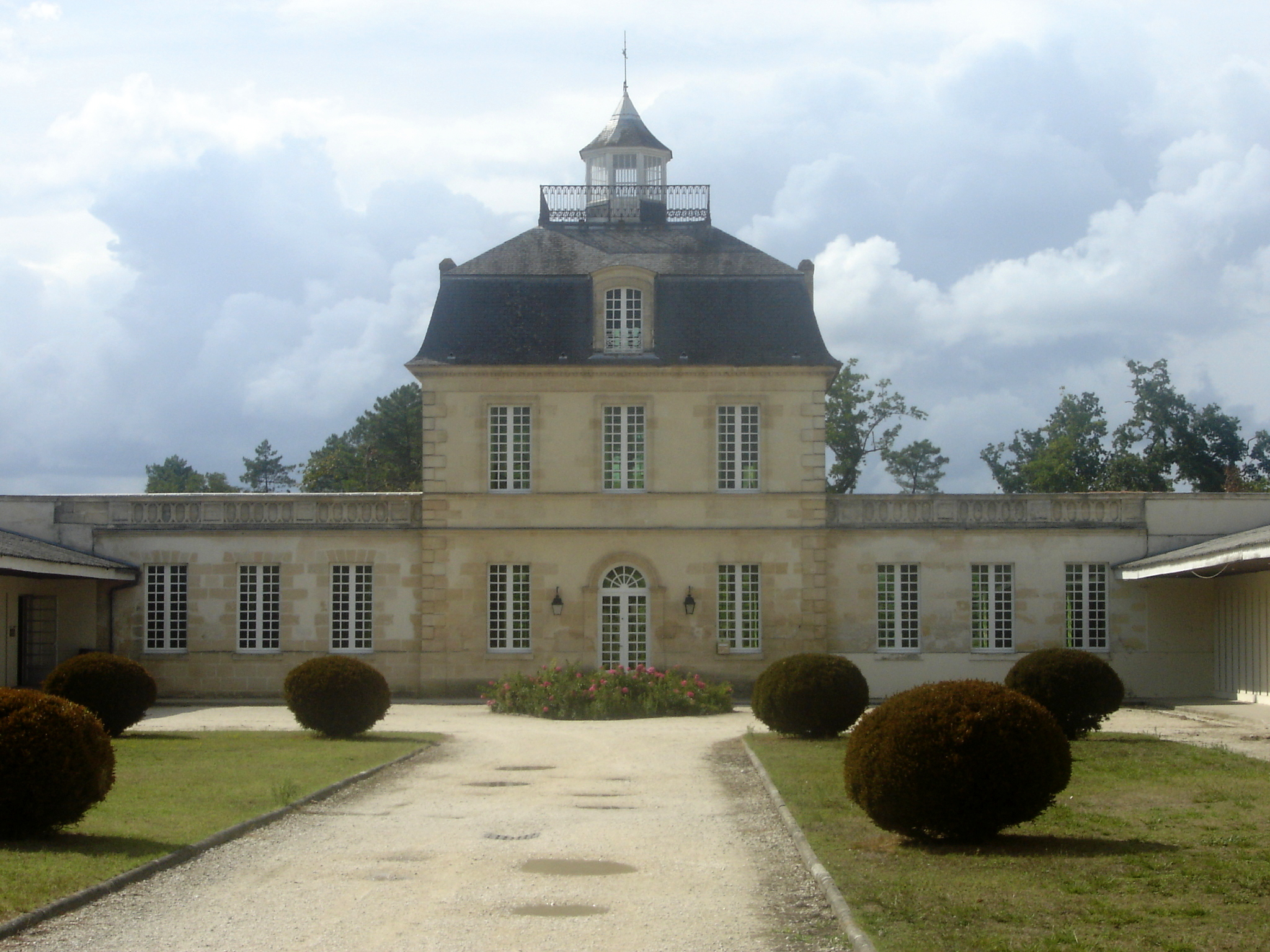 Château de Belfort de Saint-Médard-en-Jalles (Gironde, France)